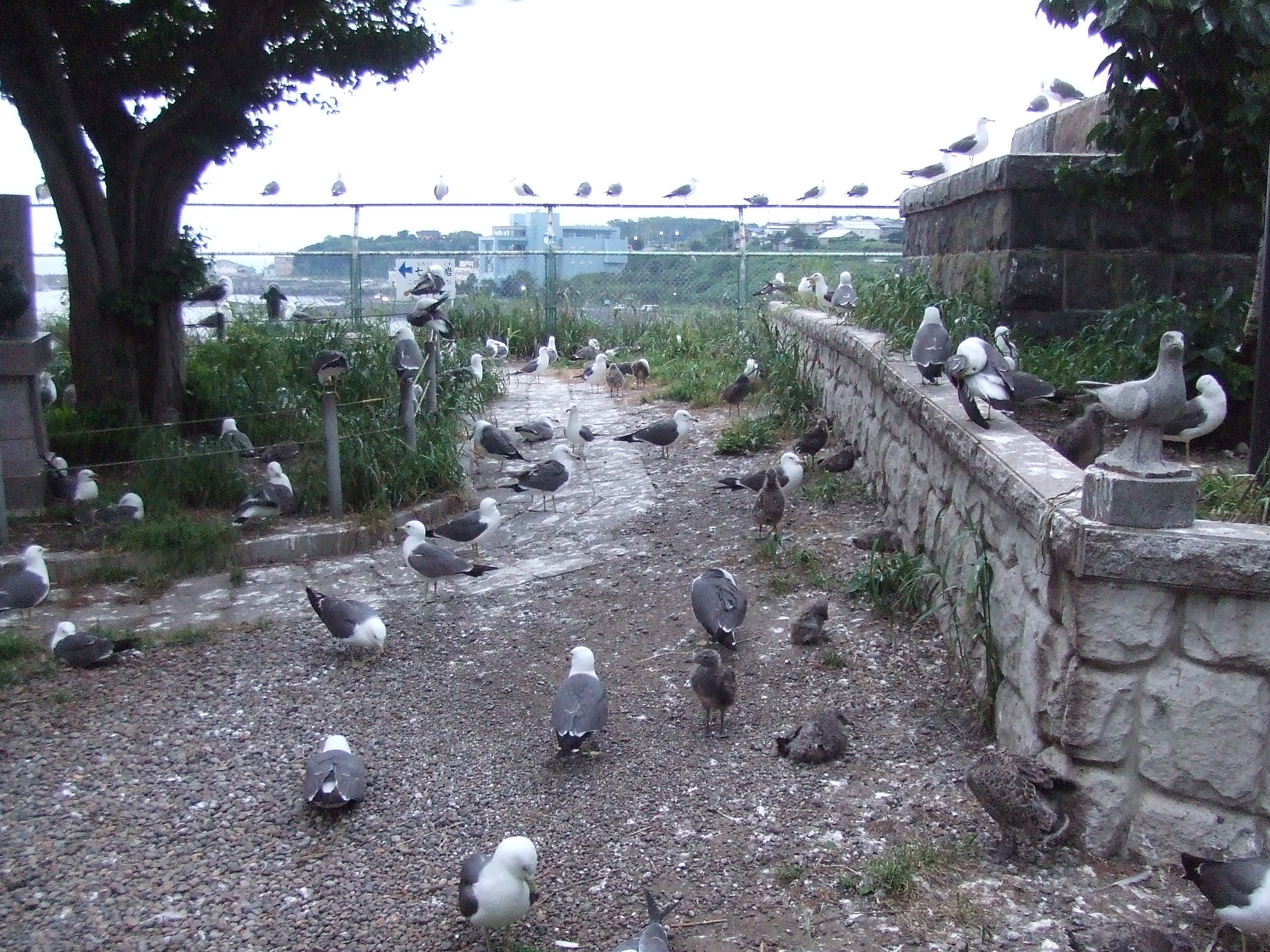 蕪島 (青森県) 多数のウミネコ達